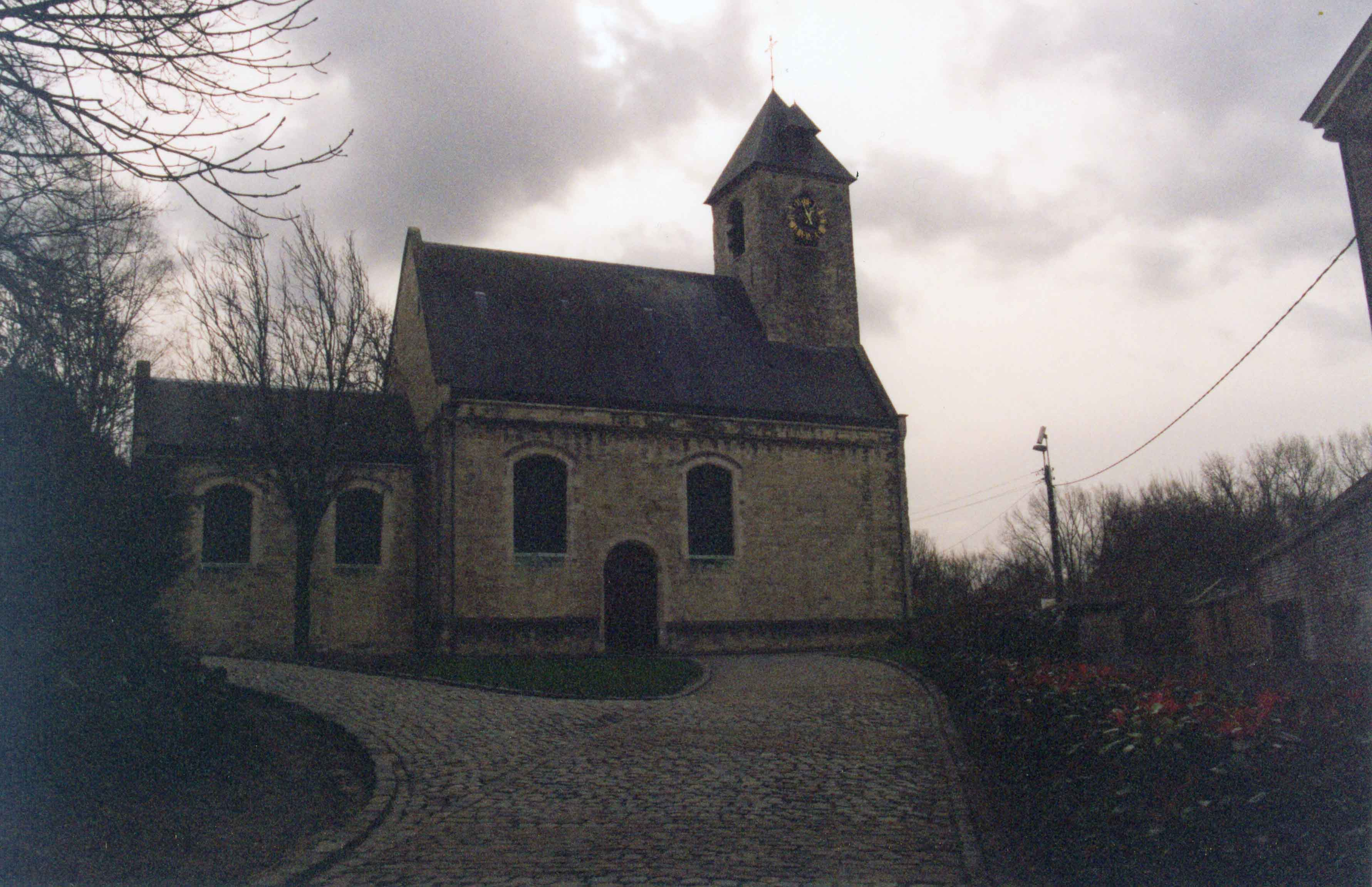 La vieille église Berchem-Sainte-Agathe. Style roman construite entre 1287 et 1311 (restauration en 1744 et 1974). Date de la prise de la photo: janvier 2001. Auteur: Ghysels Philippe